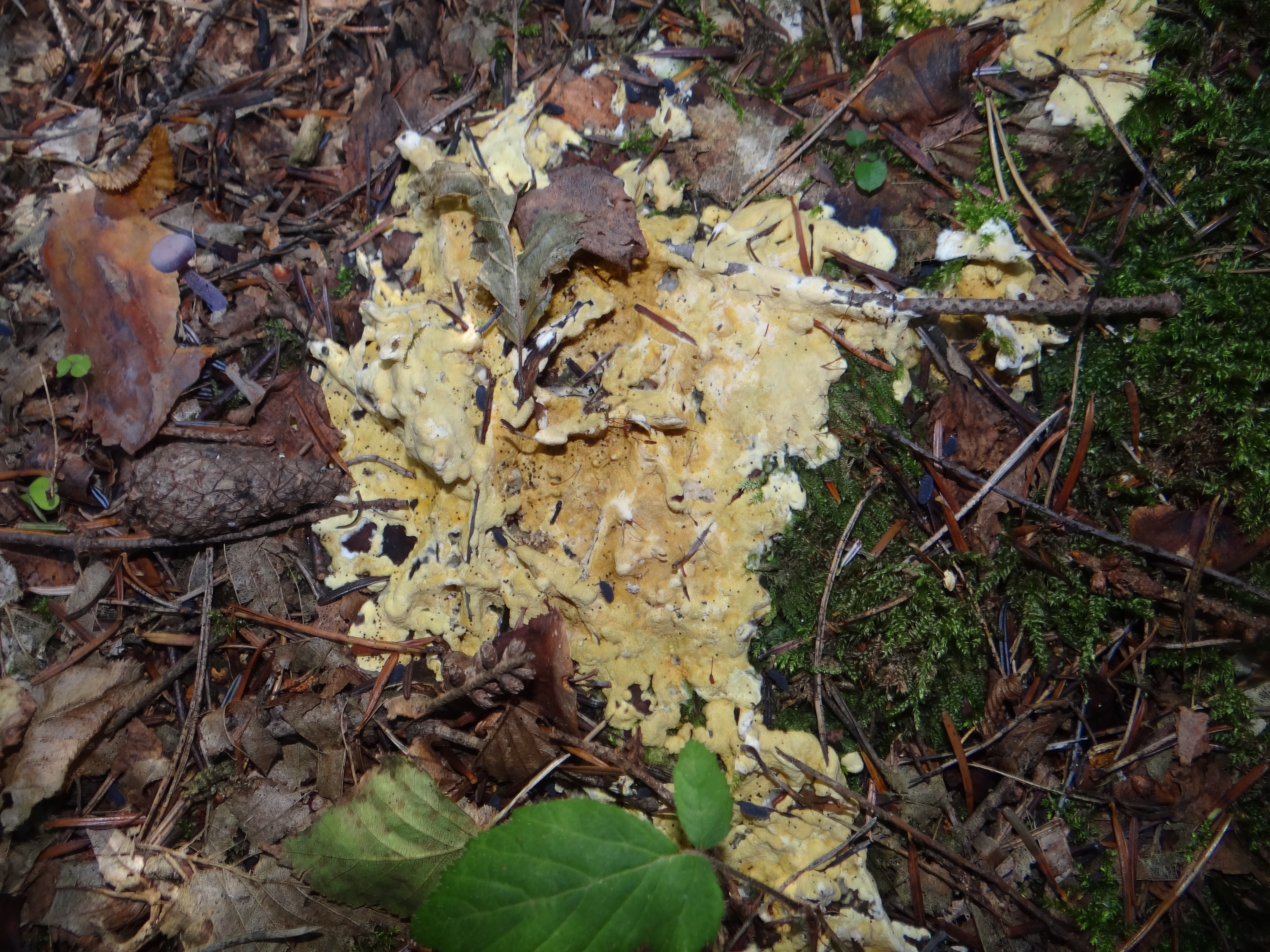 Sebacina incrustans (location: Poland, Kamionna (województwo małopolskie)